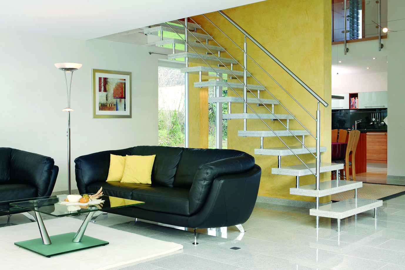 Beispiel einer modernen Tragbolzentreppe mit Natursteinstufen (Quelle Thumm & Co., Nürtingen)